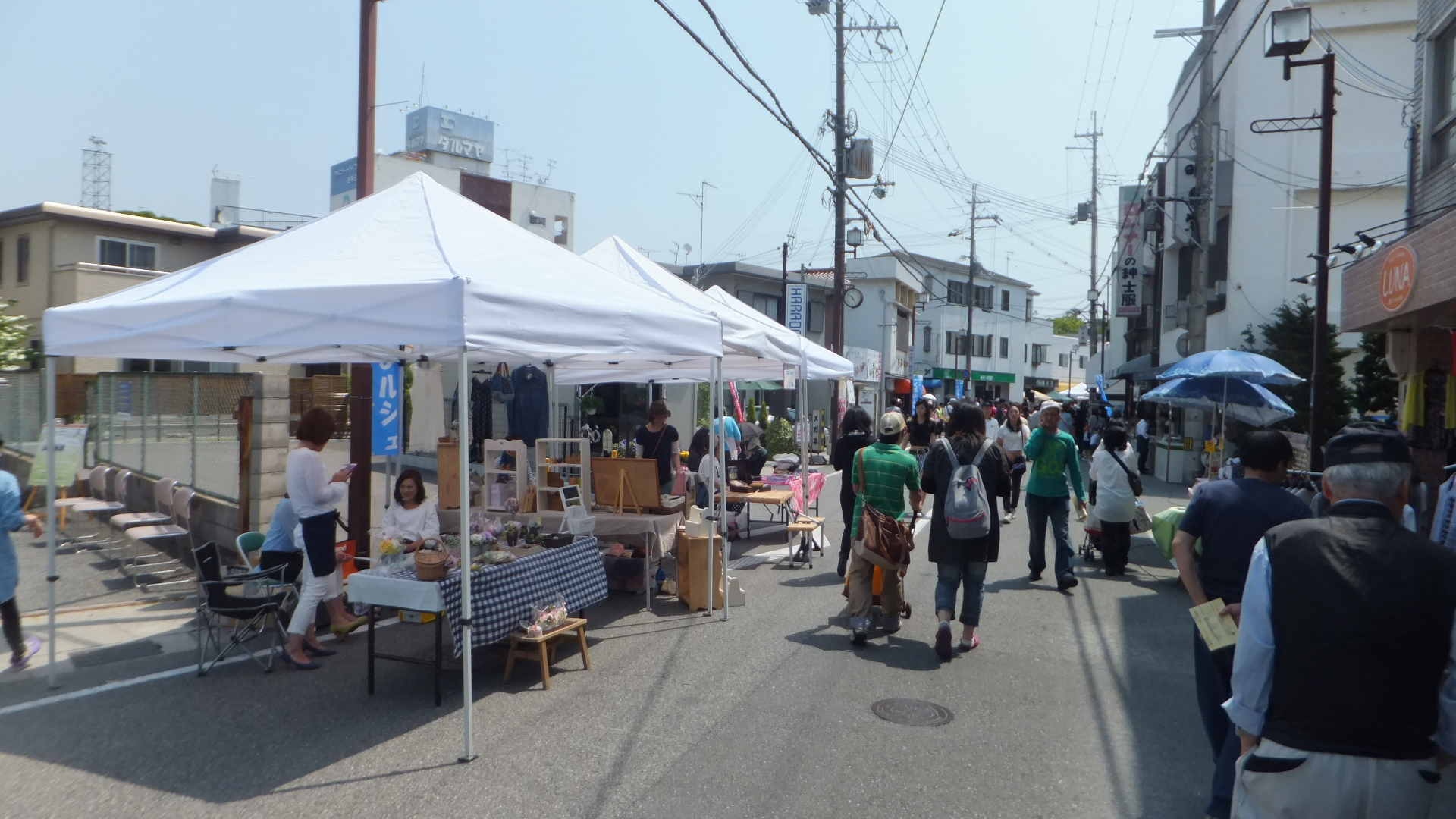 みきマルシェ